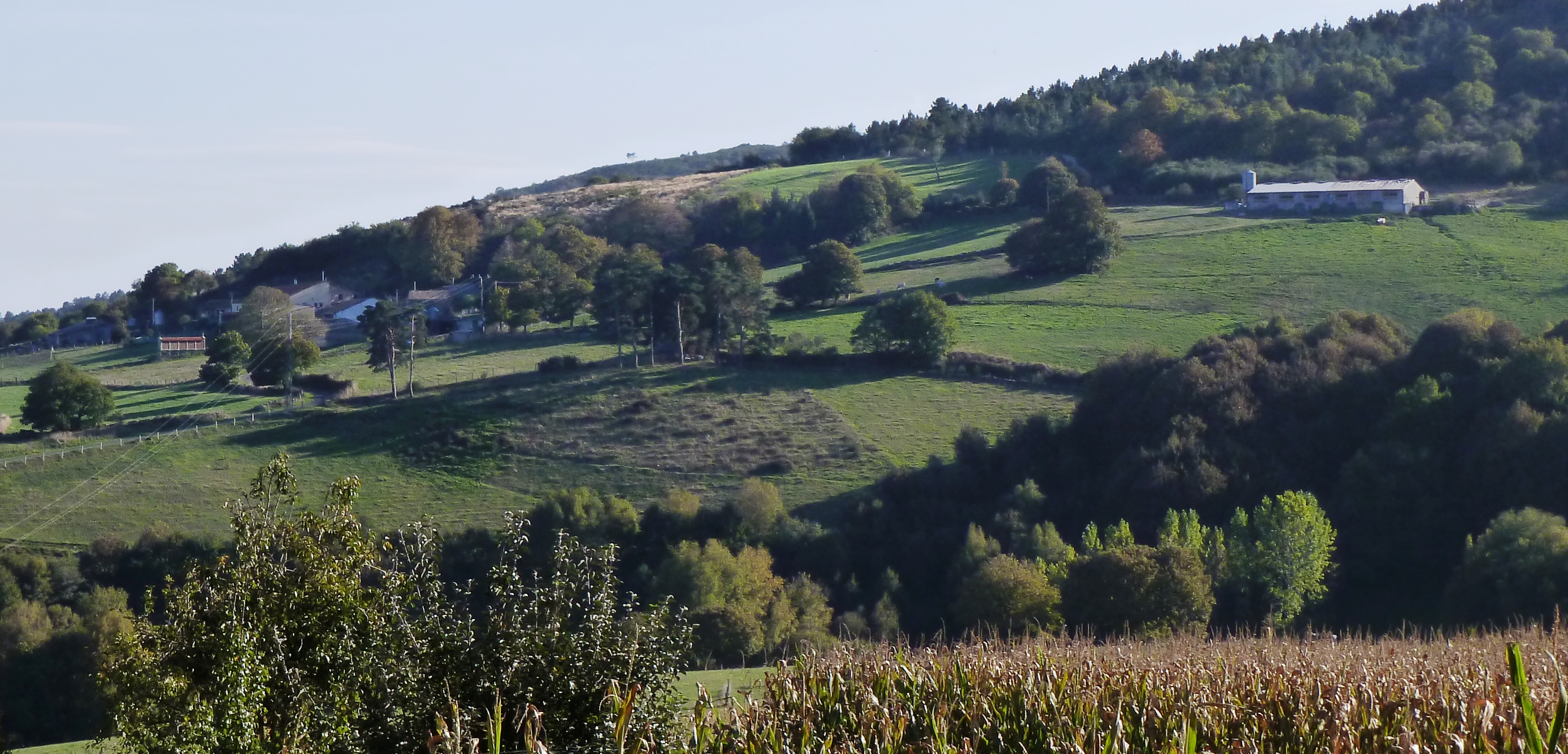 Abelairas, Furco, Carballedo